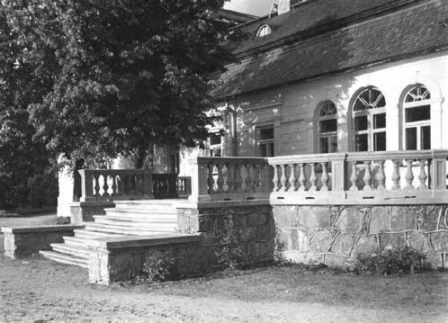 Беларуская (тарашкевіца): Опса, сядзіба Плятэраў